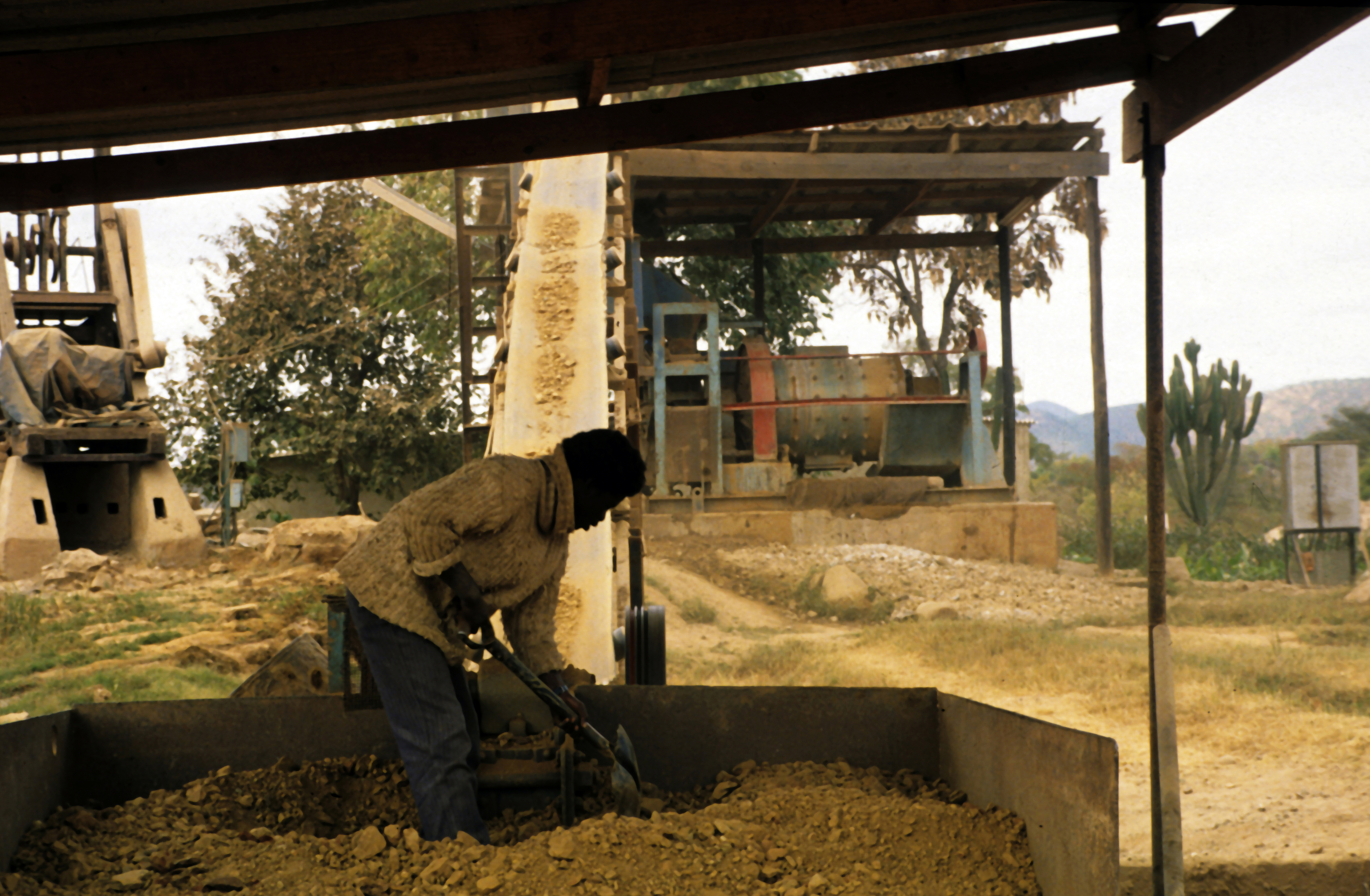 Ball mill & stamp mill, gold ore processing centre, Shamva, Zimbabwe.